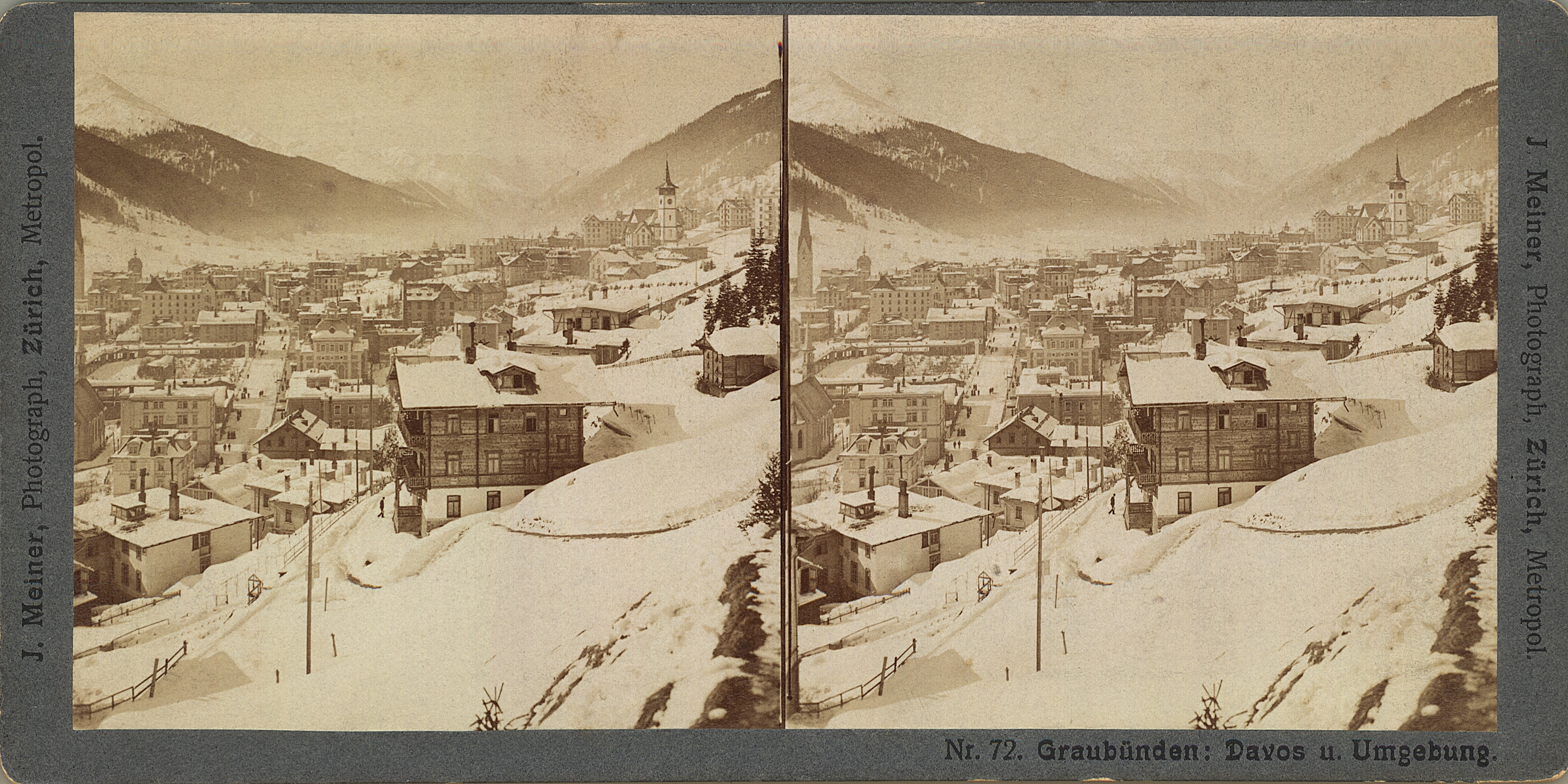 Graubünden, Davos u. Umgebung